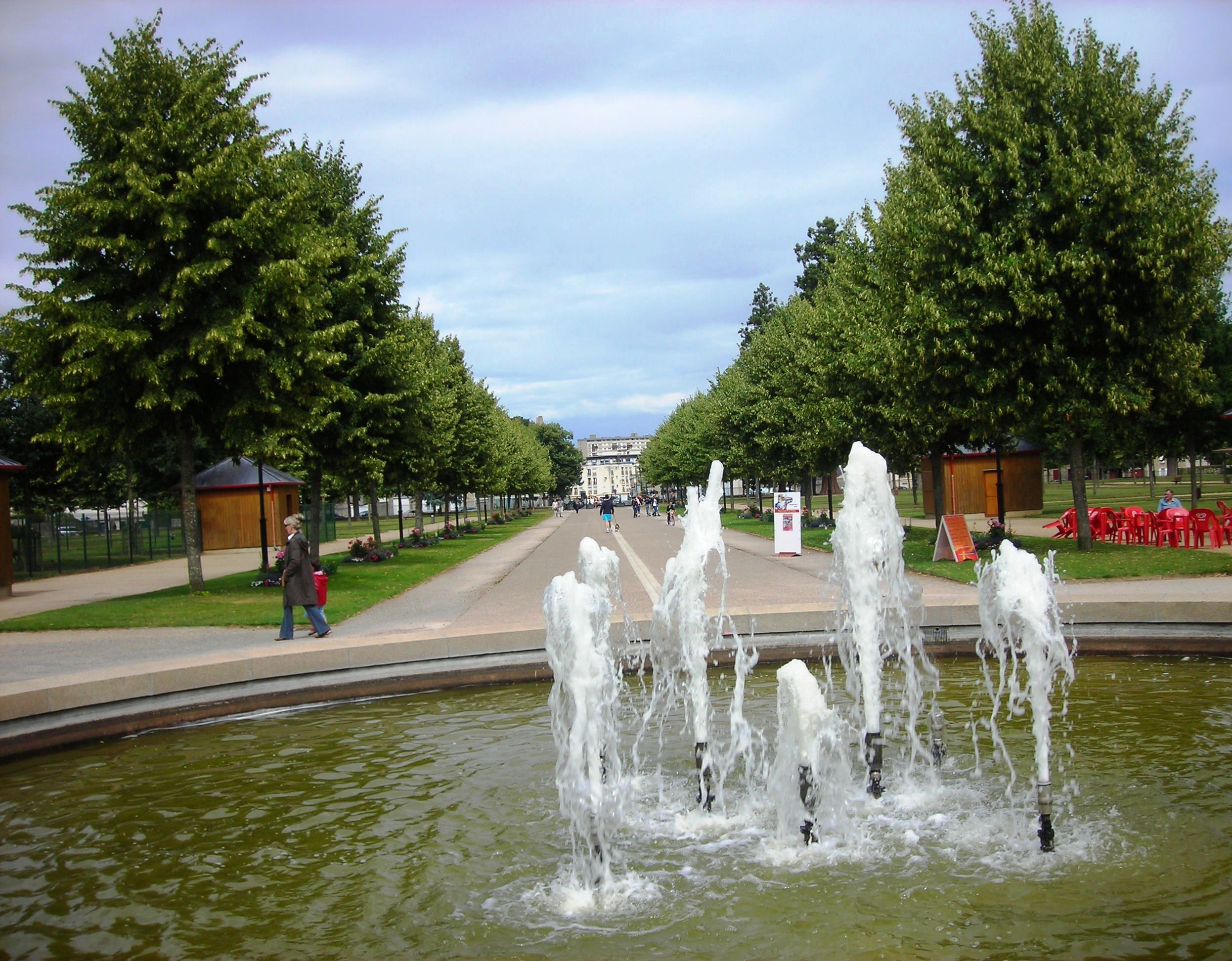 Parc des promenades d’Alençon (Orne, France) _ Vue de l’allée principale depuis la fontaine